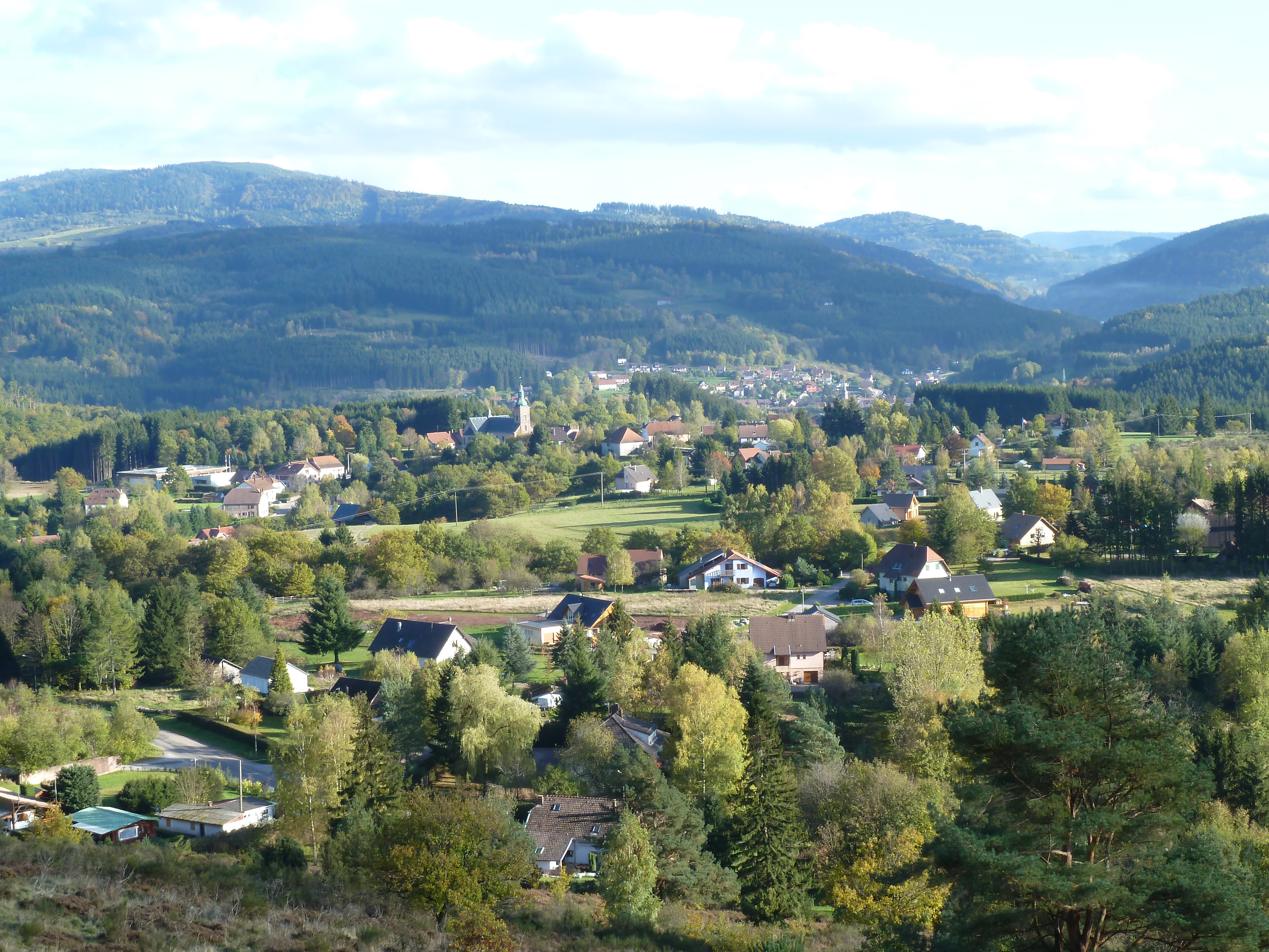 Vue à Plaine